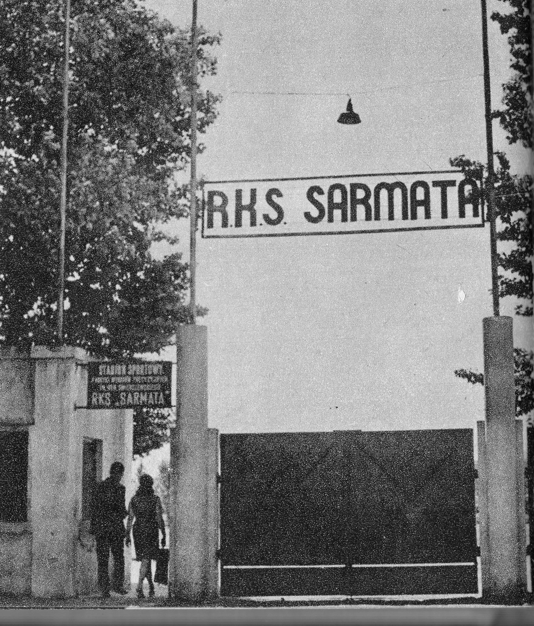 Wejście na stadion RKS Sarmata w Warszawie